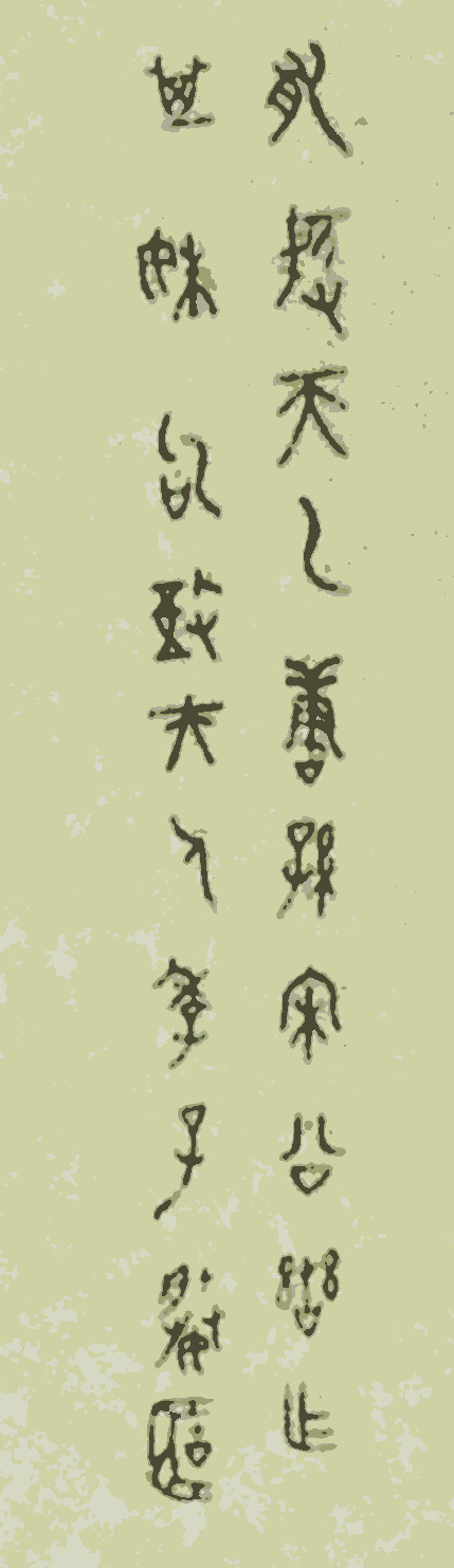 河南省固始县侯古堆一号墓出土的宋公栾铜簠上的铭文。